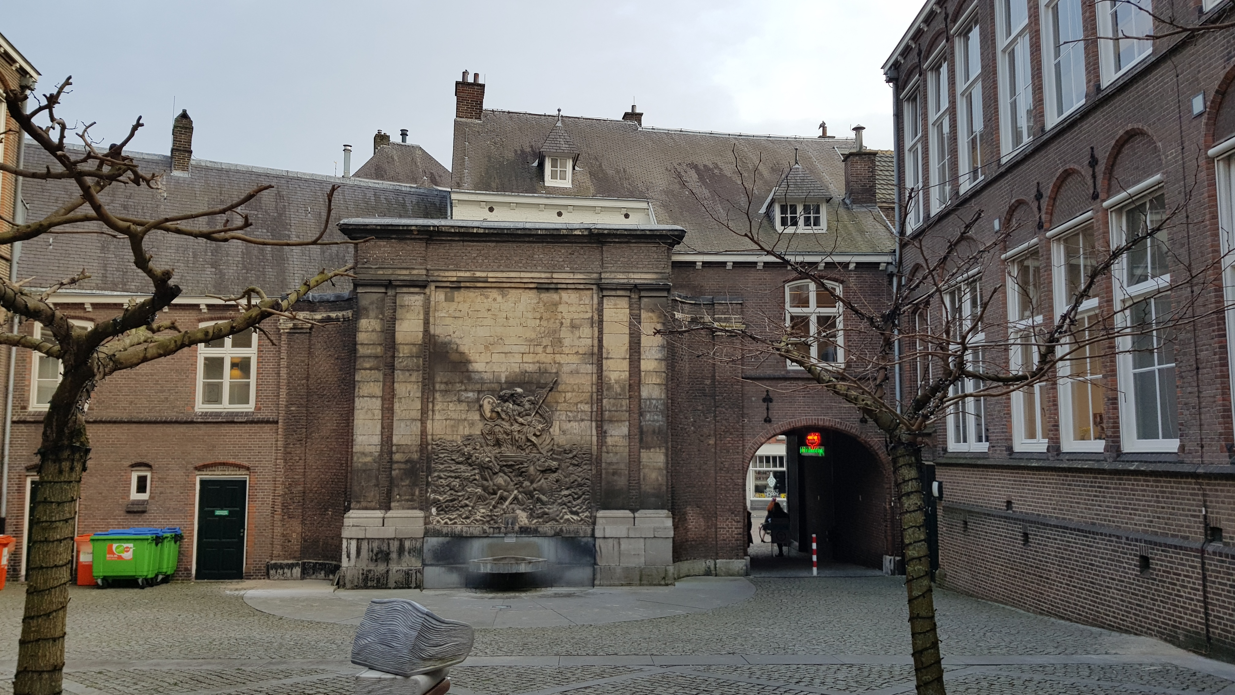 Hof van Tilly, Maastricht, Nederland